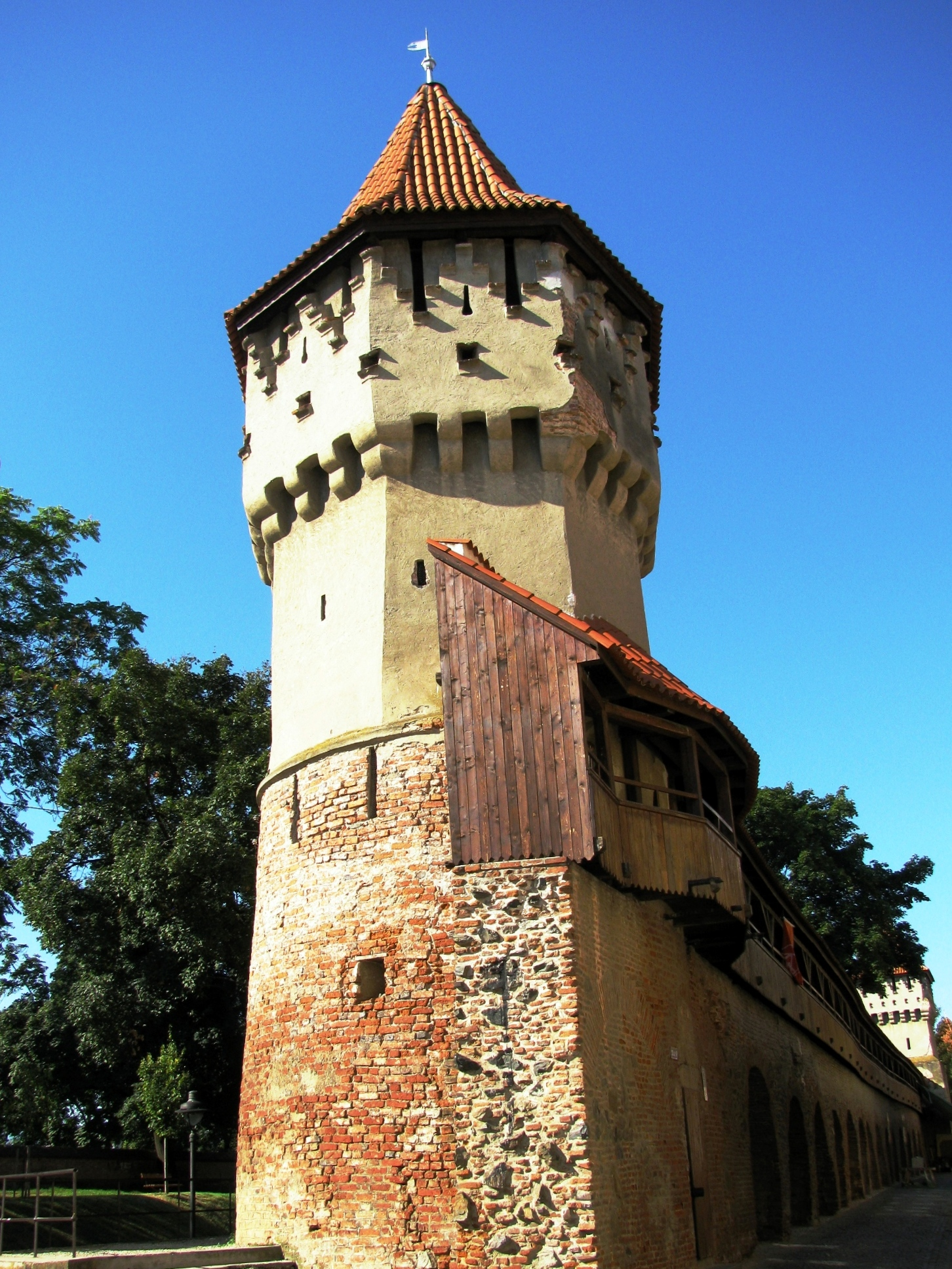 Turnul Dulgherilor a fost construit in sec. XIV - XV. Impreuna cu celelalte doua aparau latura de sud a cetatii. 03